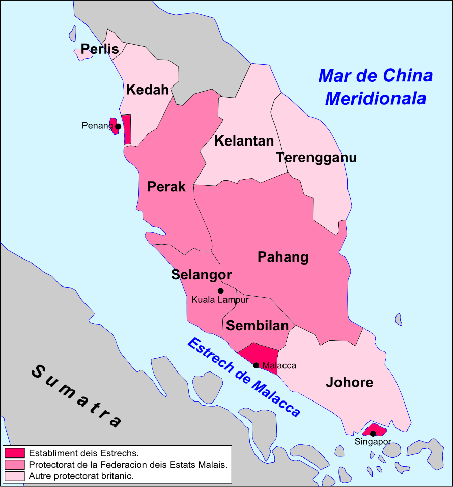 Organizacion territòriala de Malàisia dins lo corrent dau periòde coloniau.